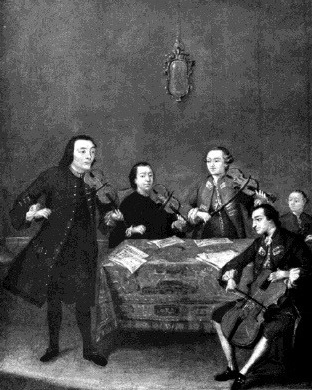 Le Quatuor Toscan avec Boccherini, Nardini, Cambini et Manfredi.